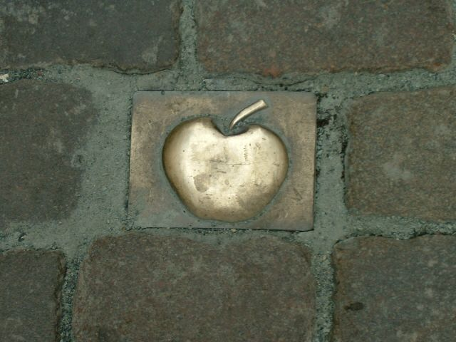 Apfel als Pflasterstein im Äbbelwoiviertel in Frankfurt-Sachsenhausen, gestaltet von Designer Marcus Botsch 2004.